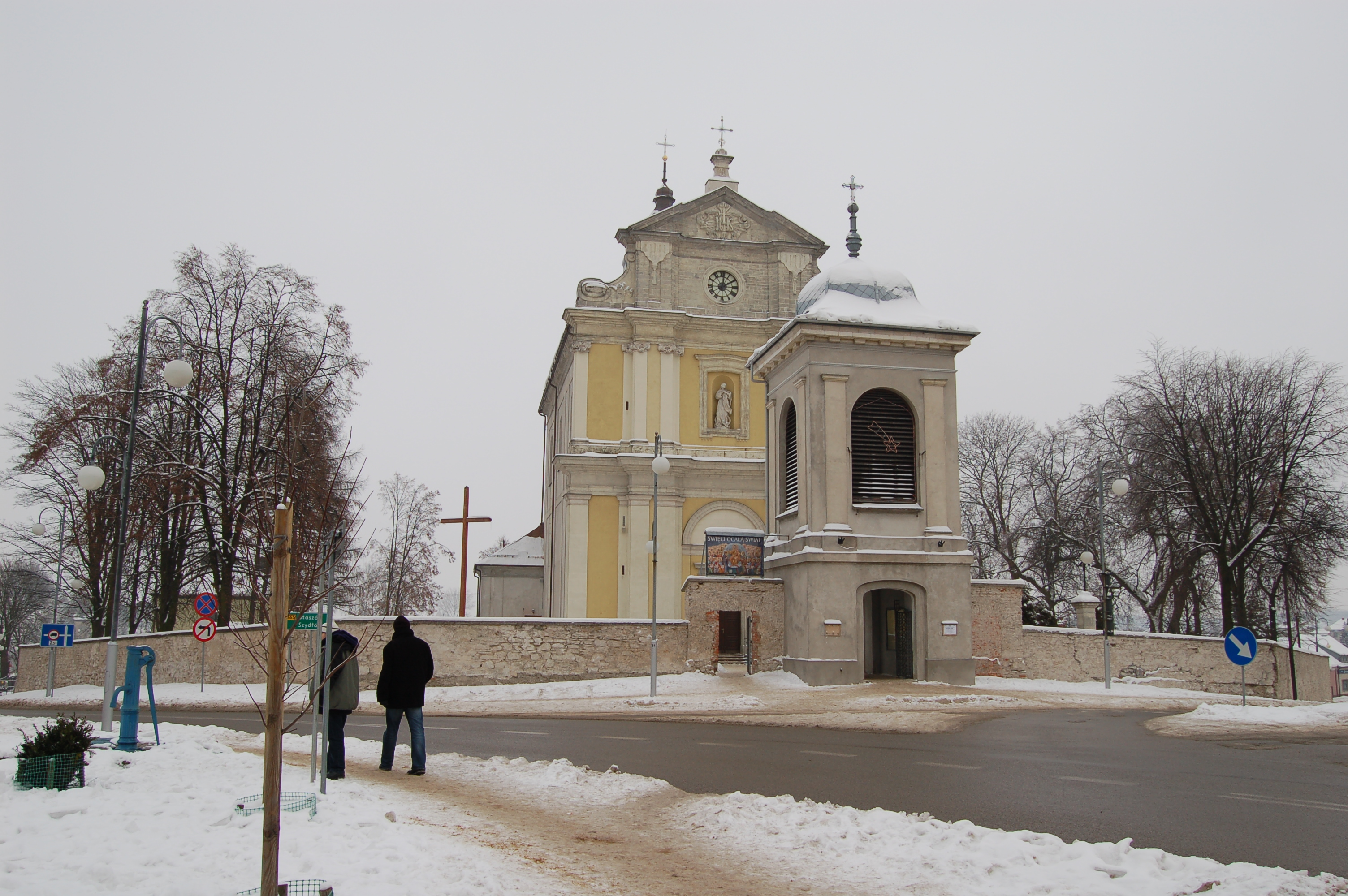 Chmielnik, kościół par. pw. Niepokalanego Poczęcia NMP, lata 1730-1783, 1892, XX w.